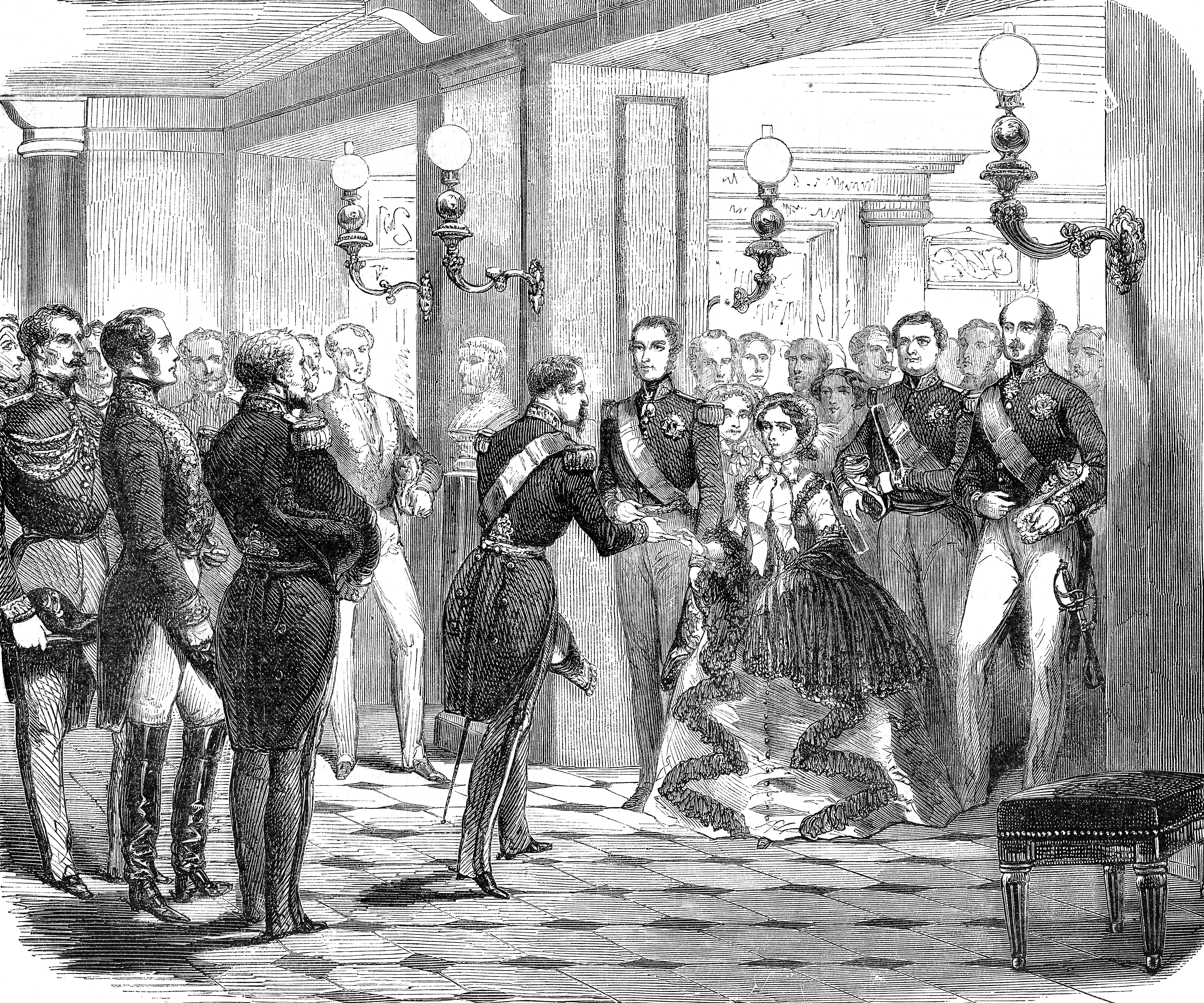 Visite de Léopold et Marie-Henriette de Belgique à l’empereur Napoléon III, Château de Saint-Cloud (France), le 12 octobre 1855.